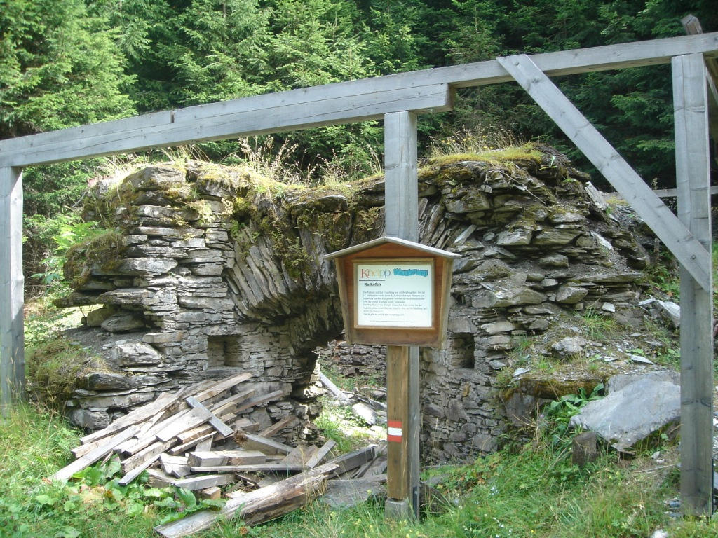 Gut erhaltener Kalkofen in Flattnitz aus dem 17. Jahrhundert